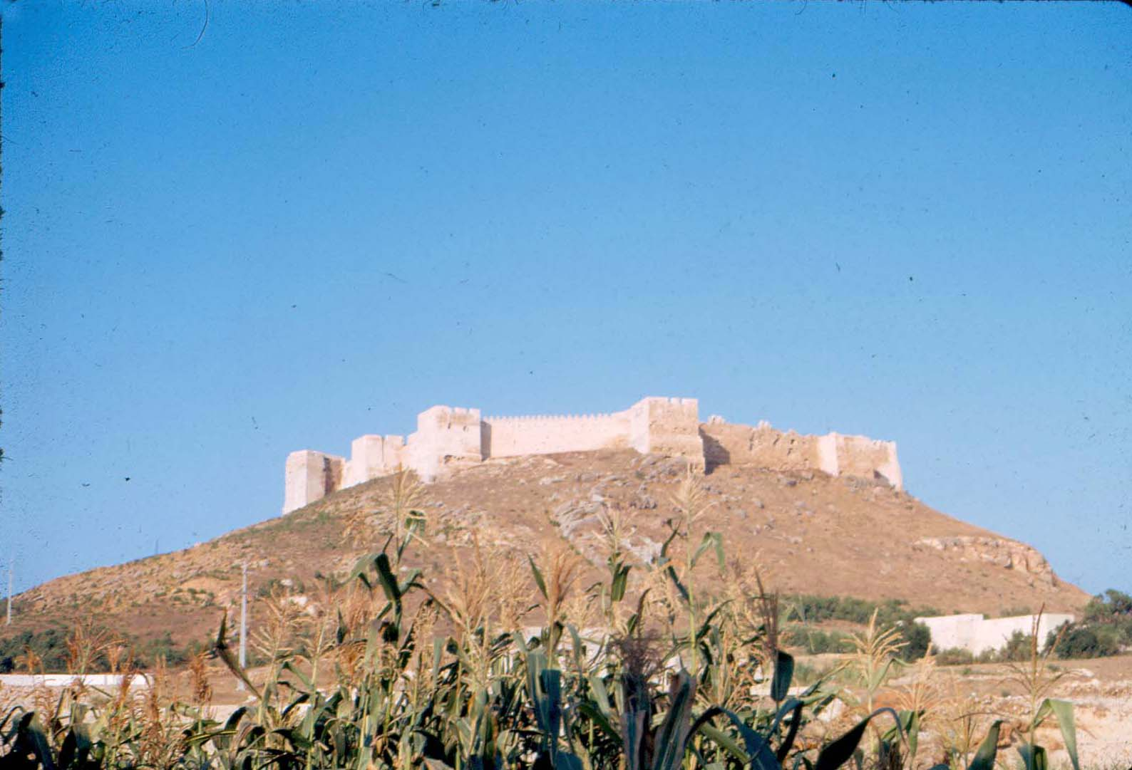 Le fort de Kélibia (1955) Bertrand Bouret